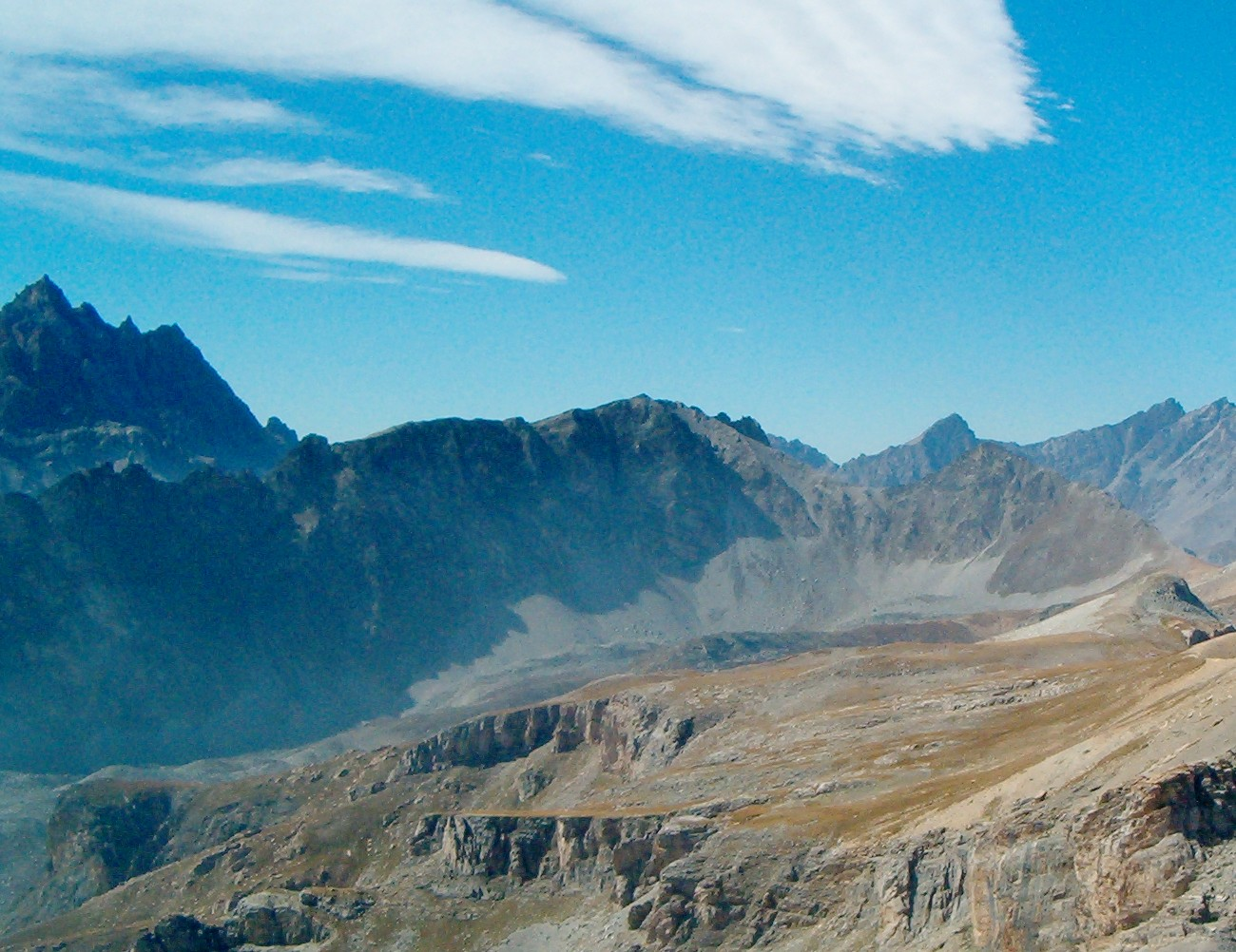 Il versante nord-est della Tête de Cialancion (Valle Maira) visto dal Monte Bellino